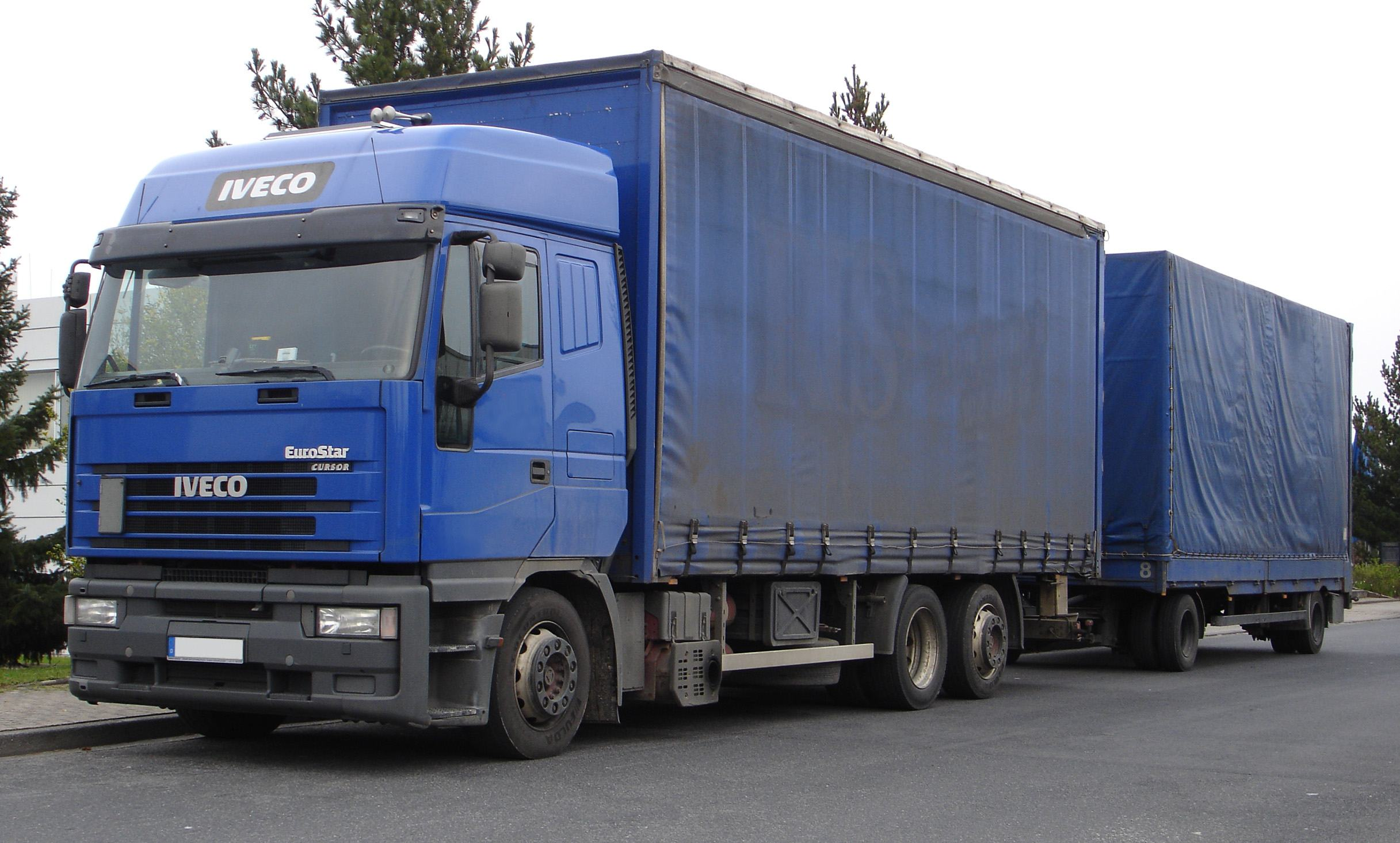 IVECO Eurostar Cursor-Vol Pritschenlastzug